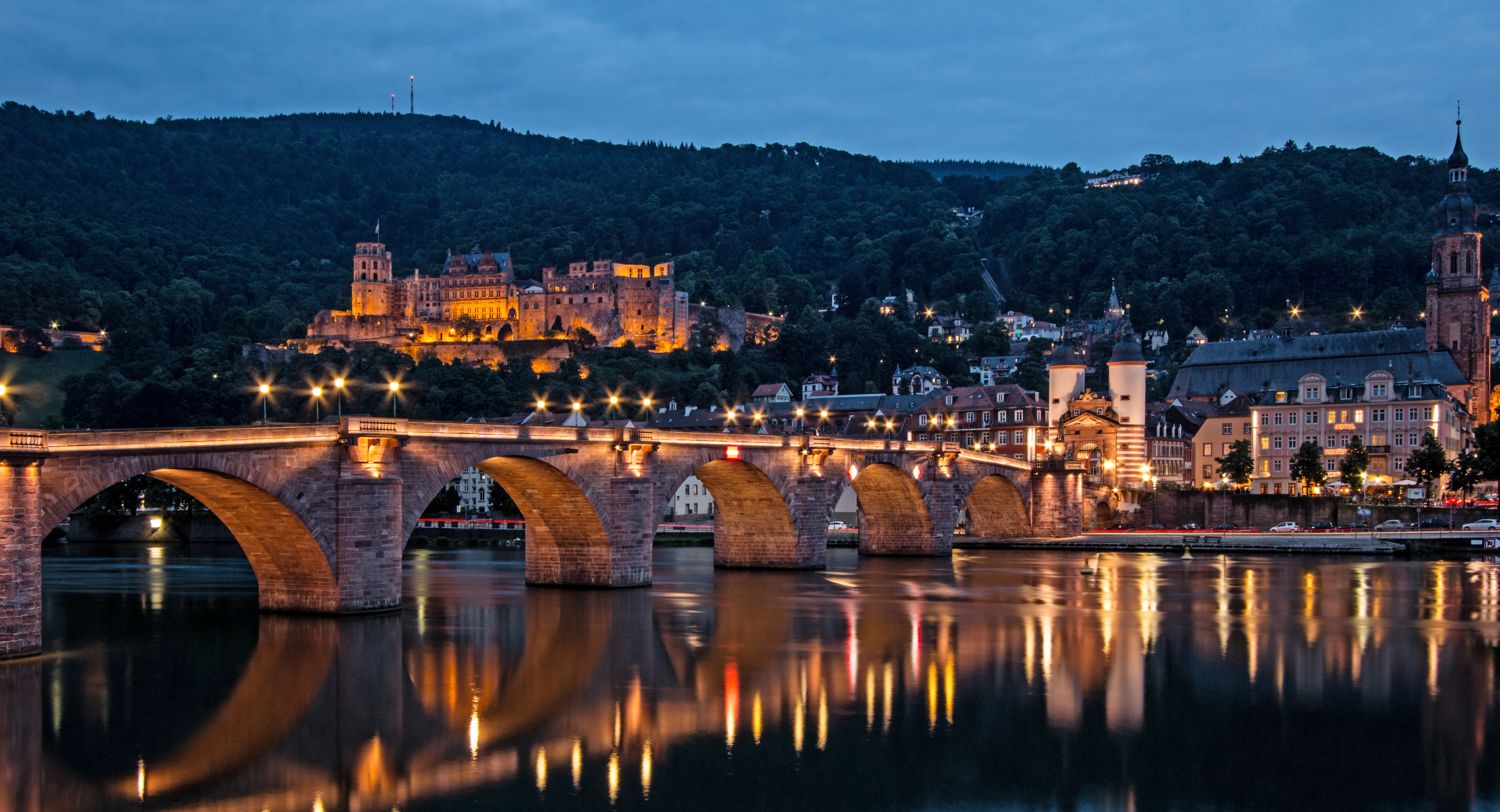 Heidelberg DE